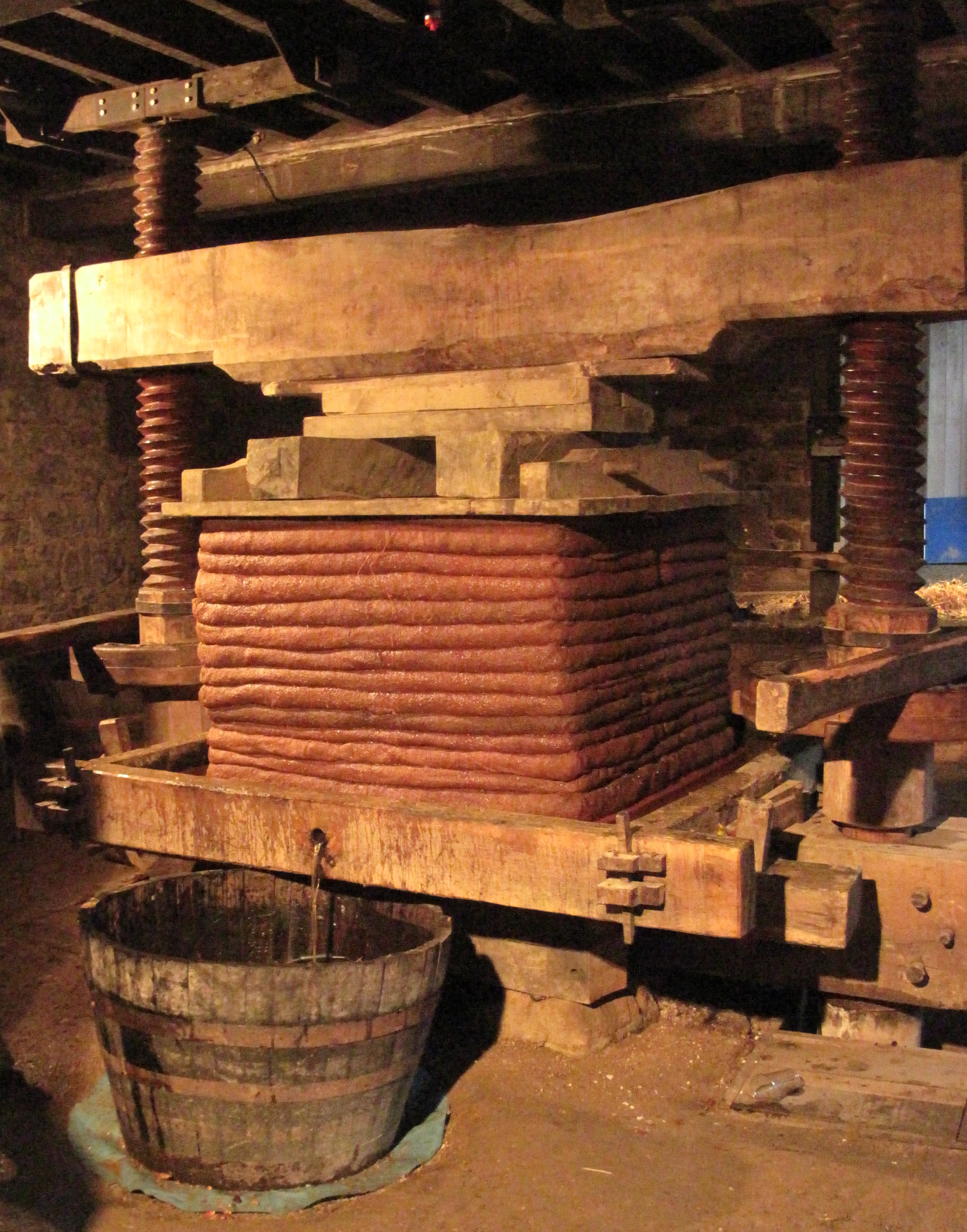 Nrf: Faîs'sie d'Cidre, Octobre 2012, Jèrri